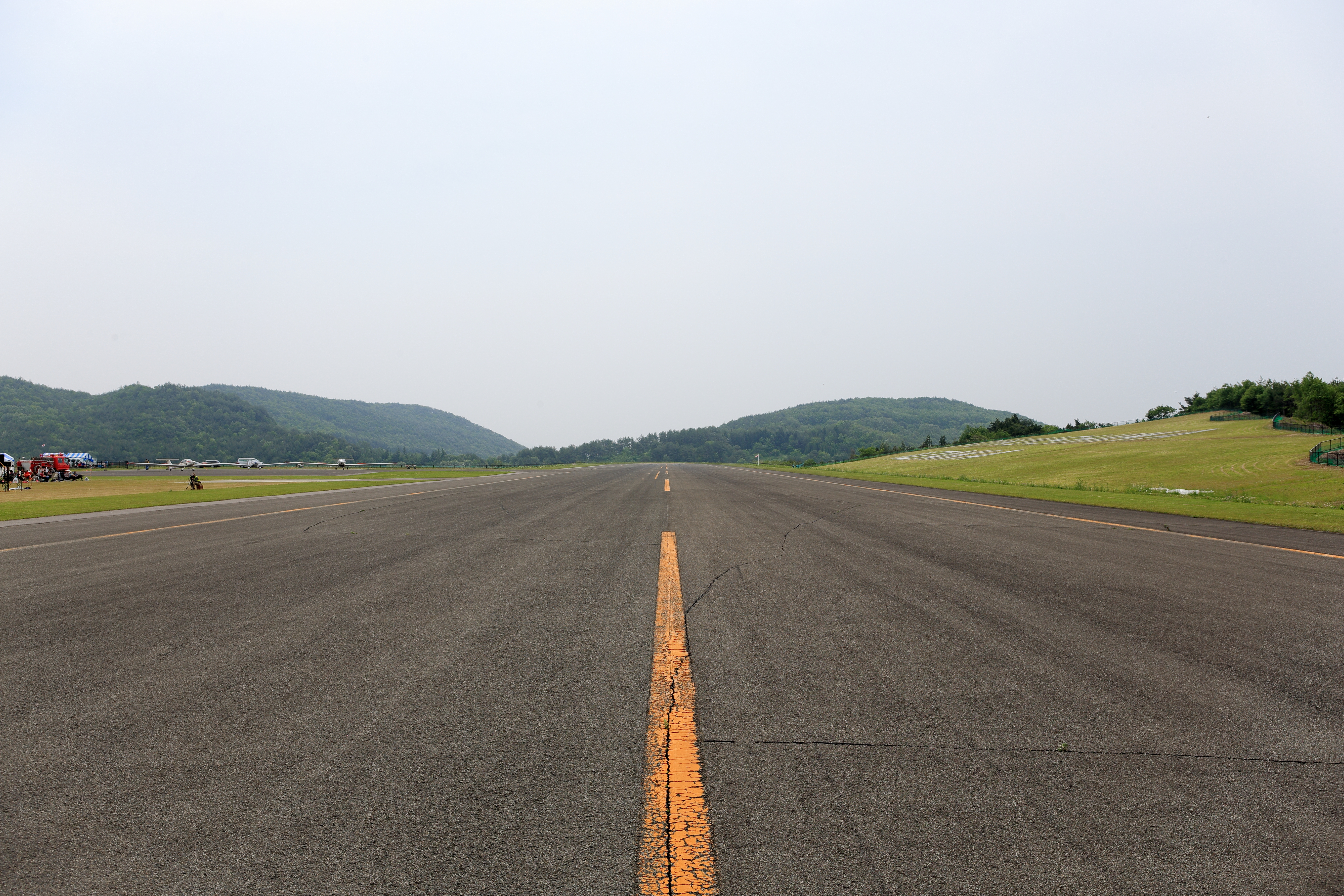 ふくしまスカイパークの滑走路。舗装面の亀裂は、東日本大震災の影響で発生したもの。